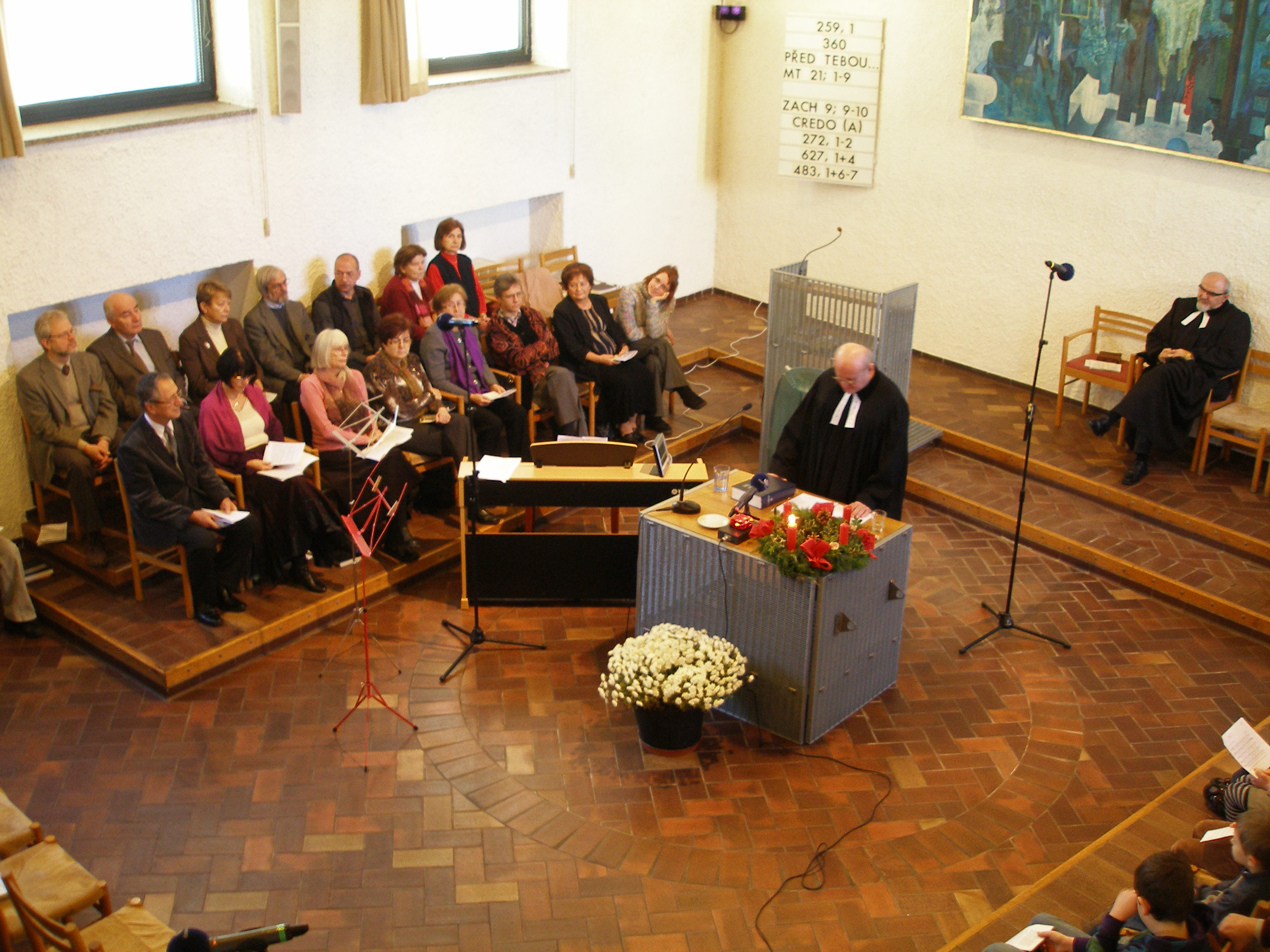 Přímý přenos Českého rozhlasu z bohoslužeb 27. listopadu 2011 z kostela U Jákobova žebříku.